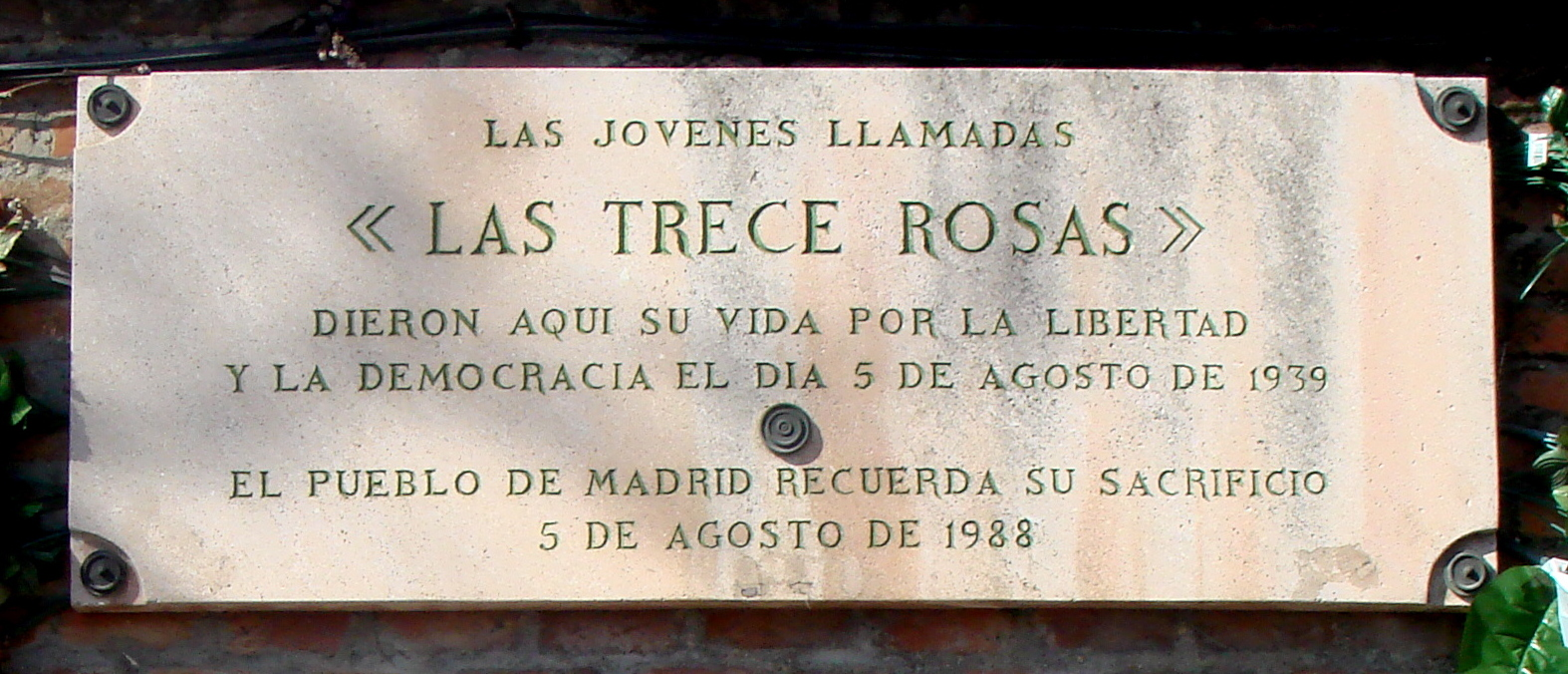 Monumento a «Las Trece Rosas» en el Cementerio de la Almudena, Madrid (España)